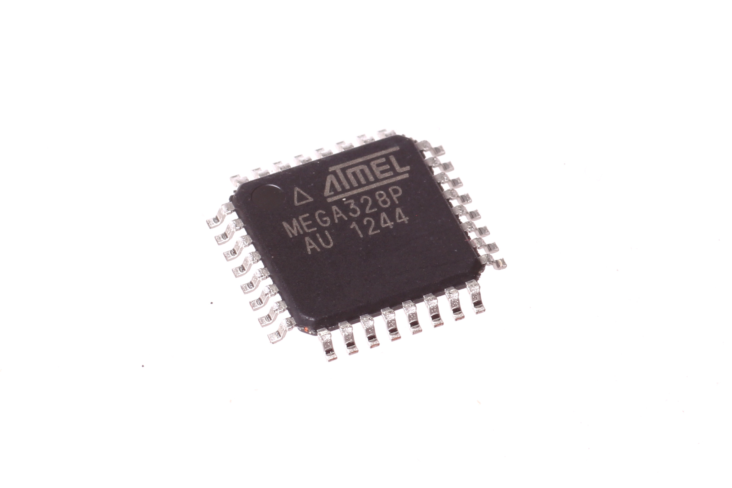 32 Pin SMD (TQFP) ATmega328P.